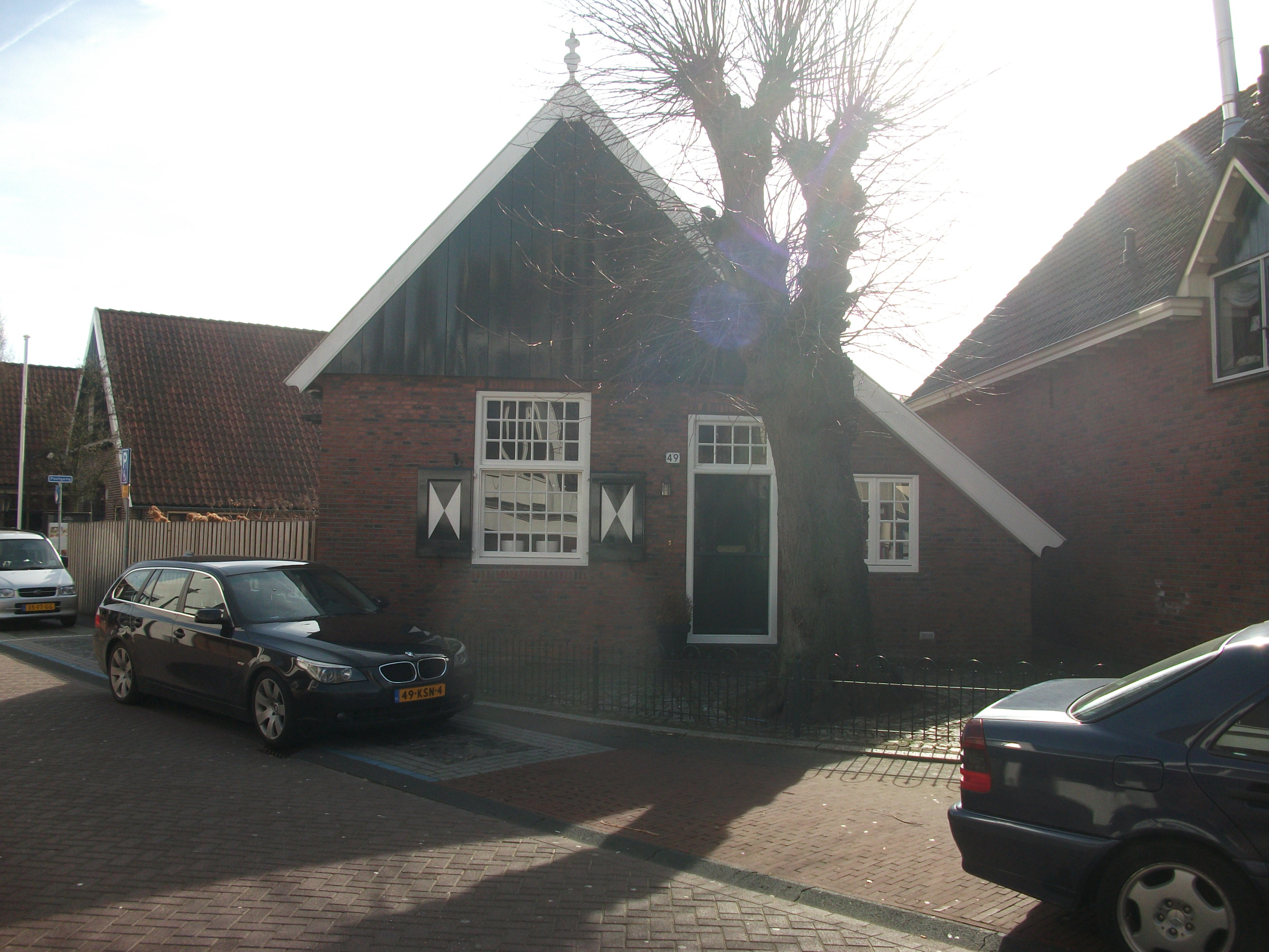 Bouwstraat 49, Rijssen (maart 2013)